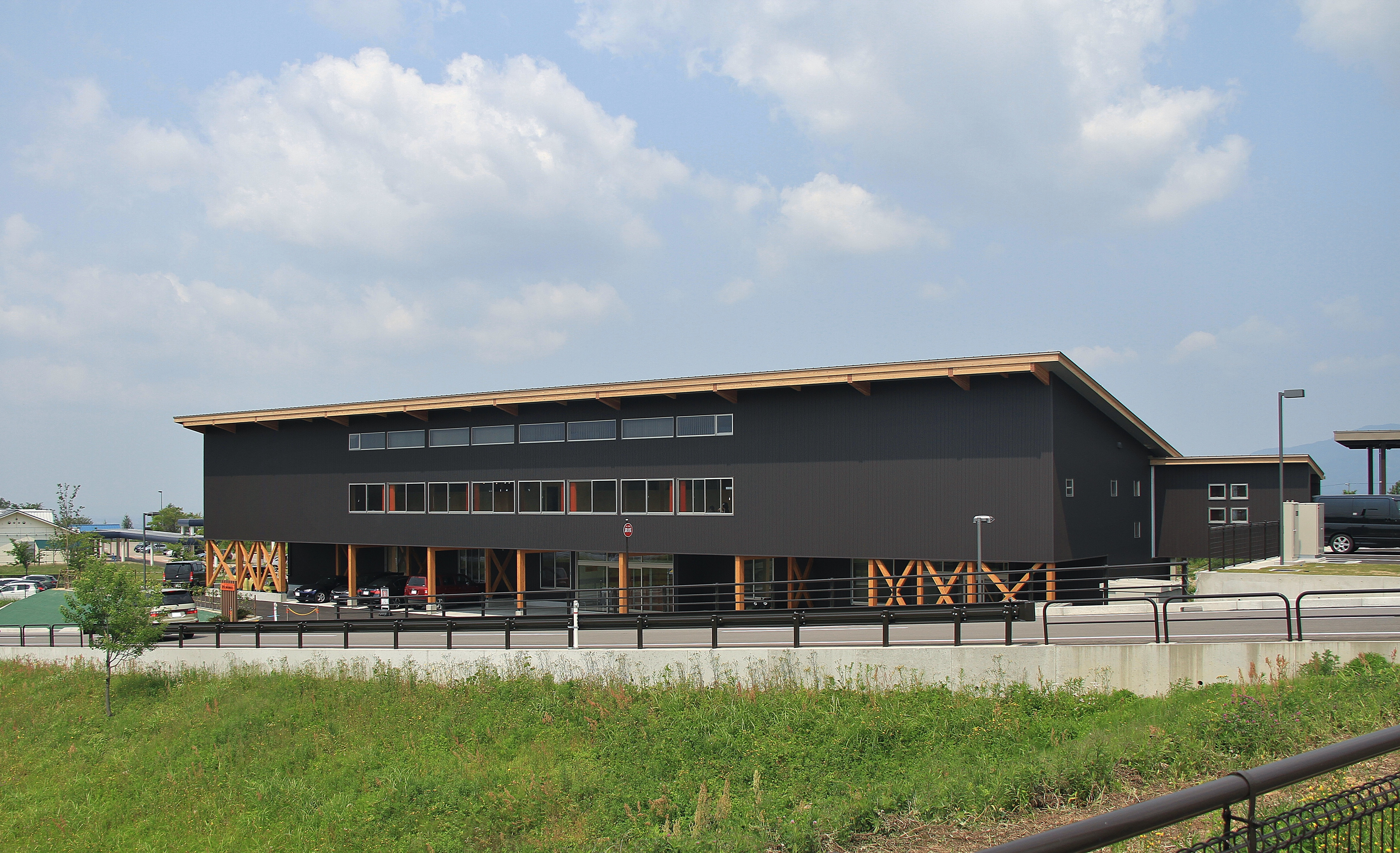 P.A. WORKS